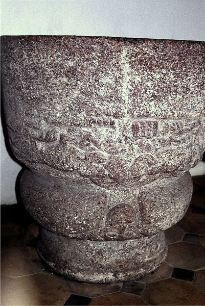 Vester Egede Kirke i Danmark. Vester Egede kirke, døbefont